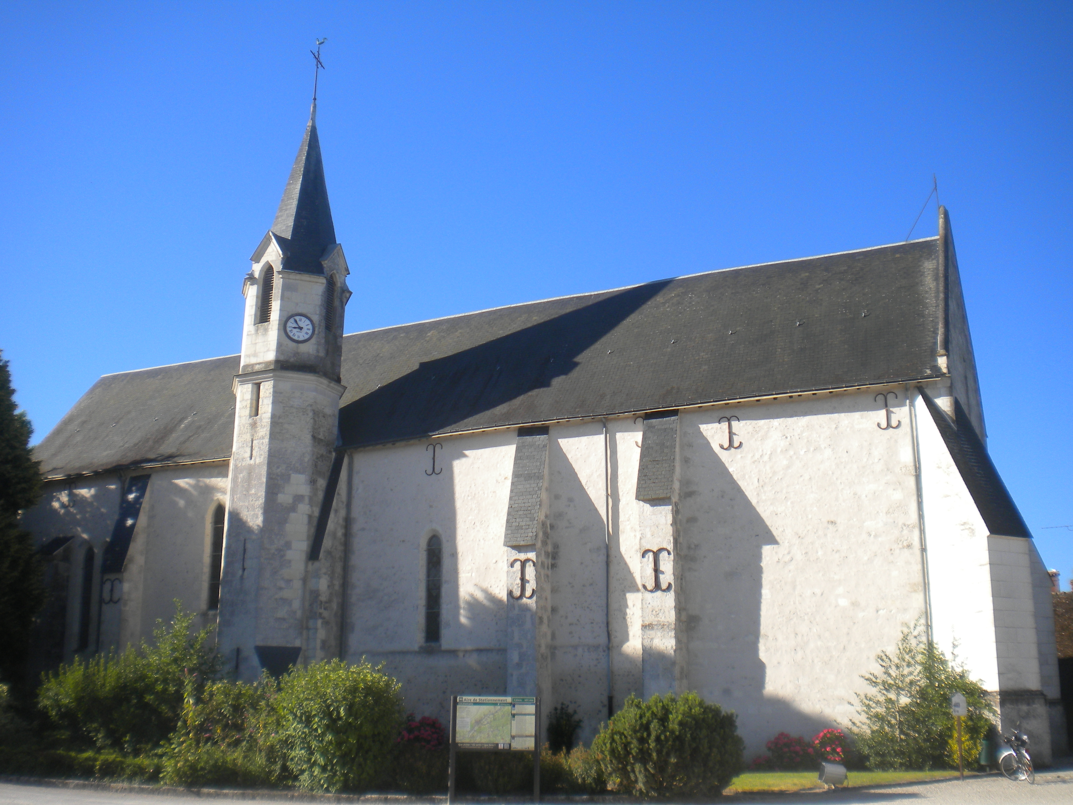 Courmemin: iliz